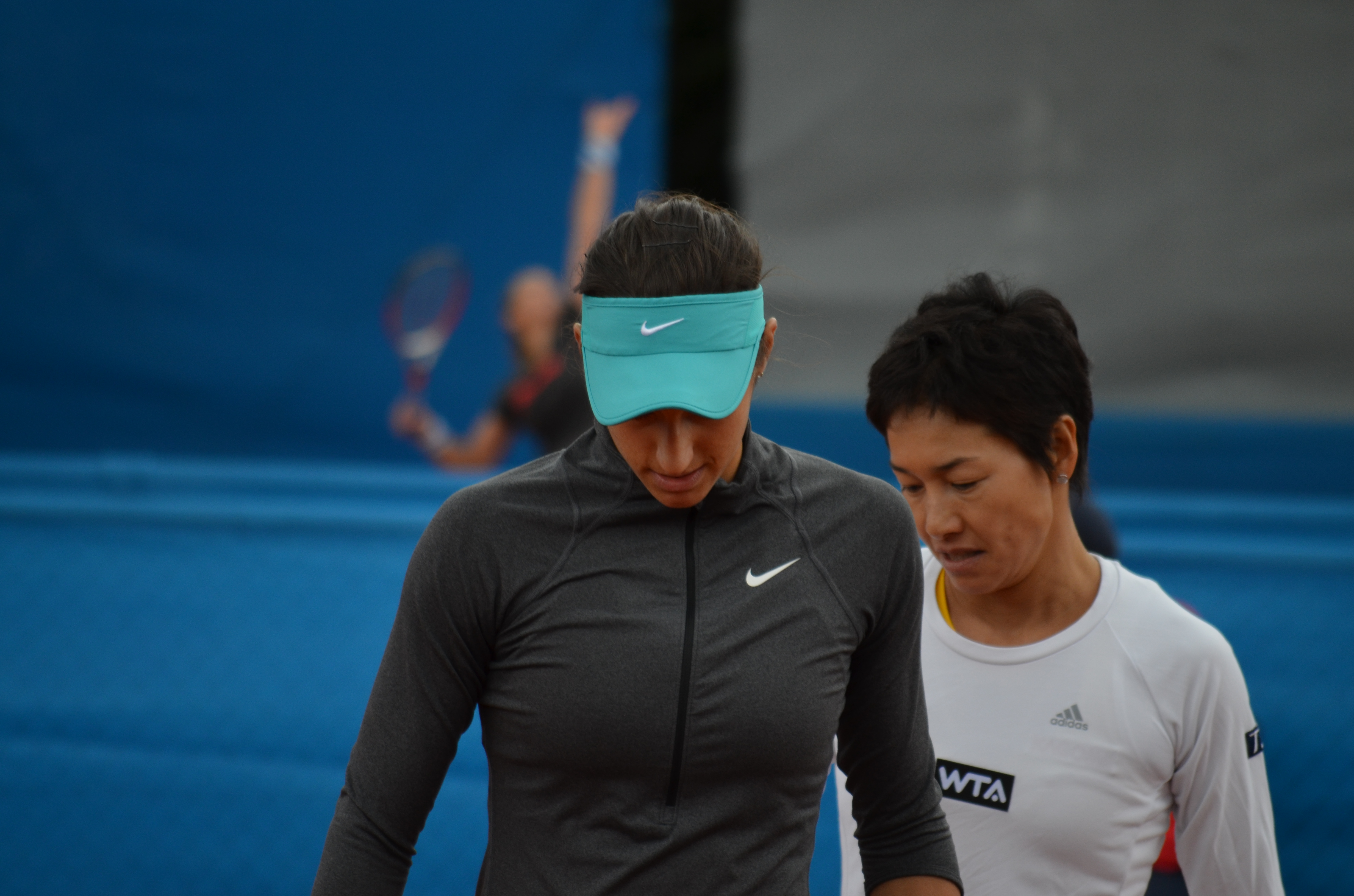 Kimiko Date-Krumm und Caroline Garcia in der Erstrundenbegegnung der Doppelkonkurrenz gegen Marina Melnikova und Teodora Mircic beim Nürnberger Versicherungscup 2014